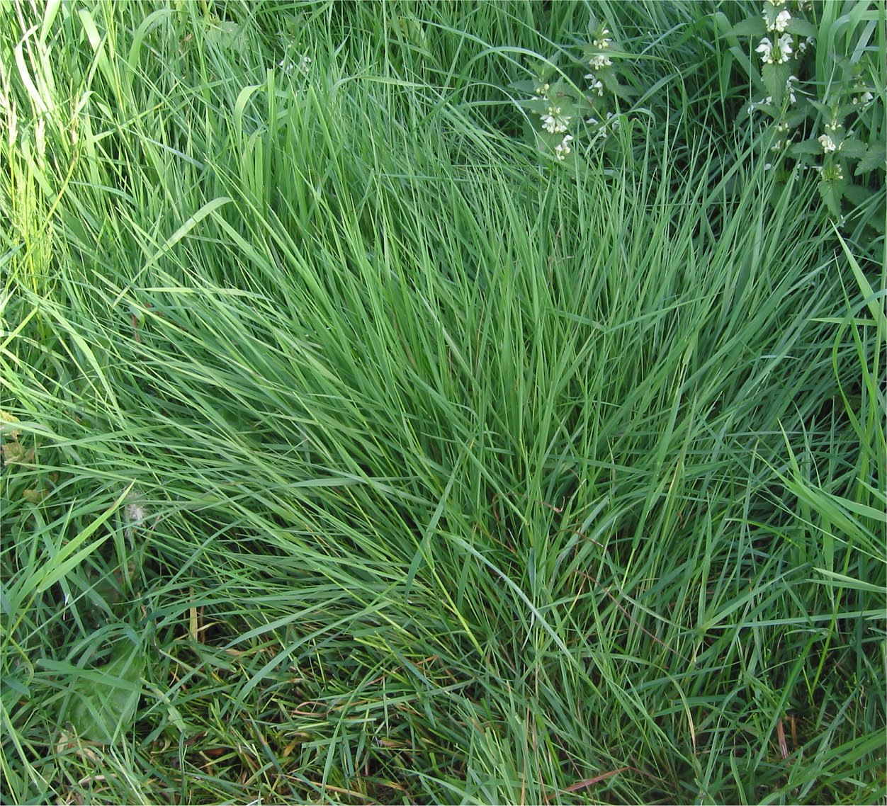 (Gewoon struisgras) Agrostis tenuis